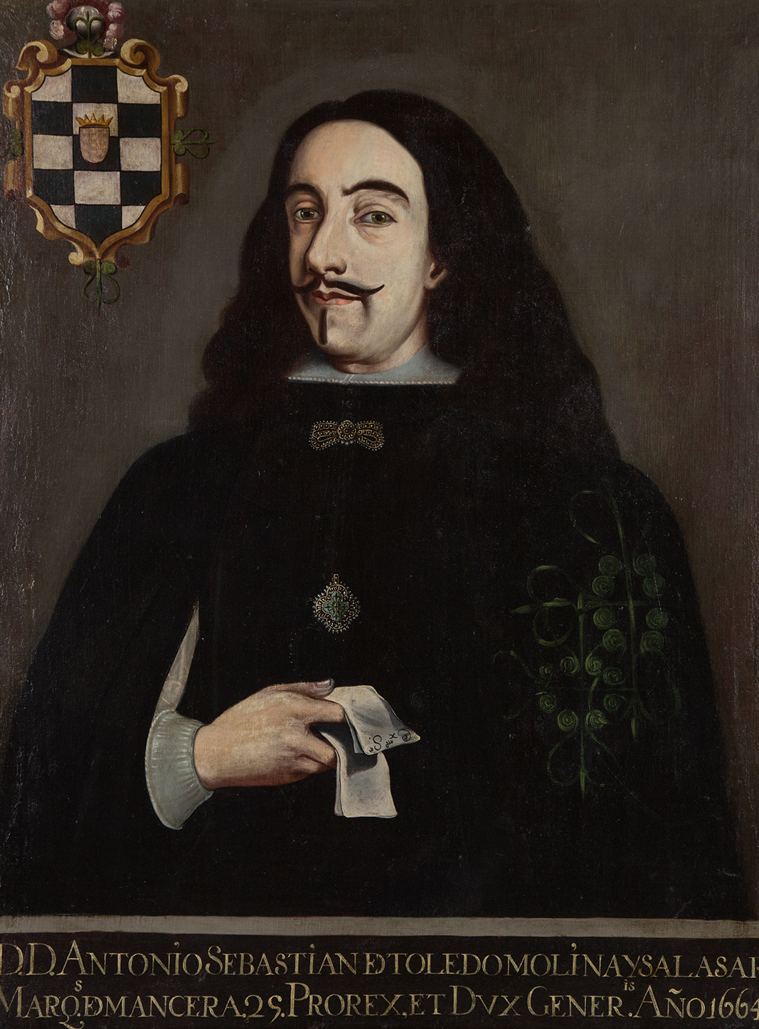 Antonio Sebastián Álvarez de Toledo, 25° Virrey de Nueva España, II Marqués de Mancera y Grande de España.